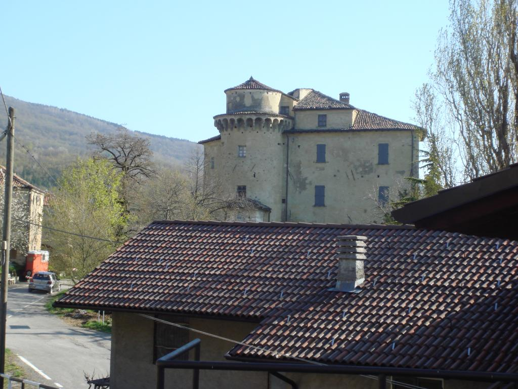 particolare del castello della frazione di Borgo Adorno (Cantalupo Ligure)